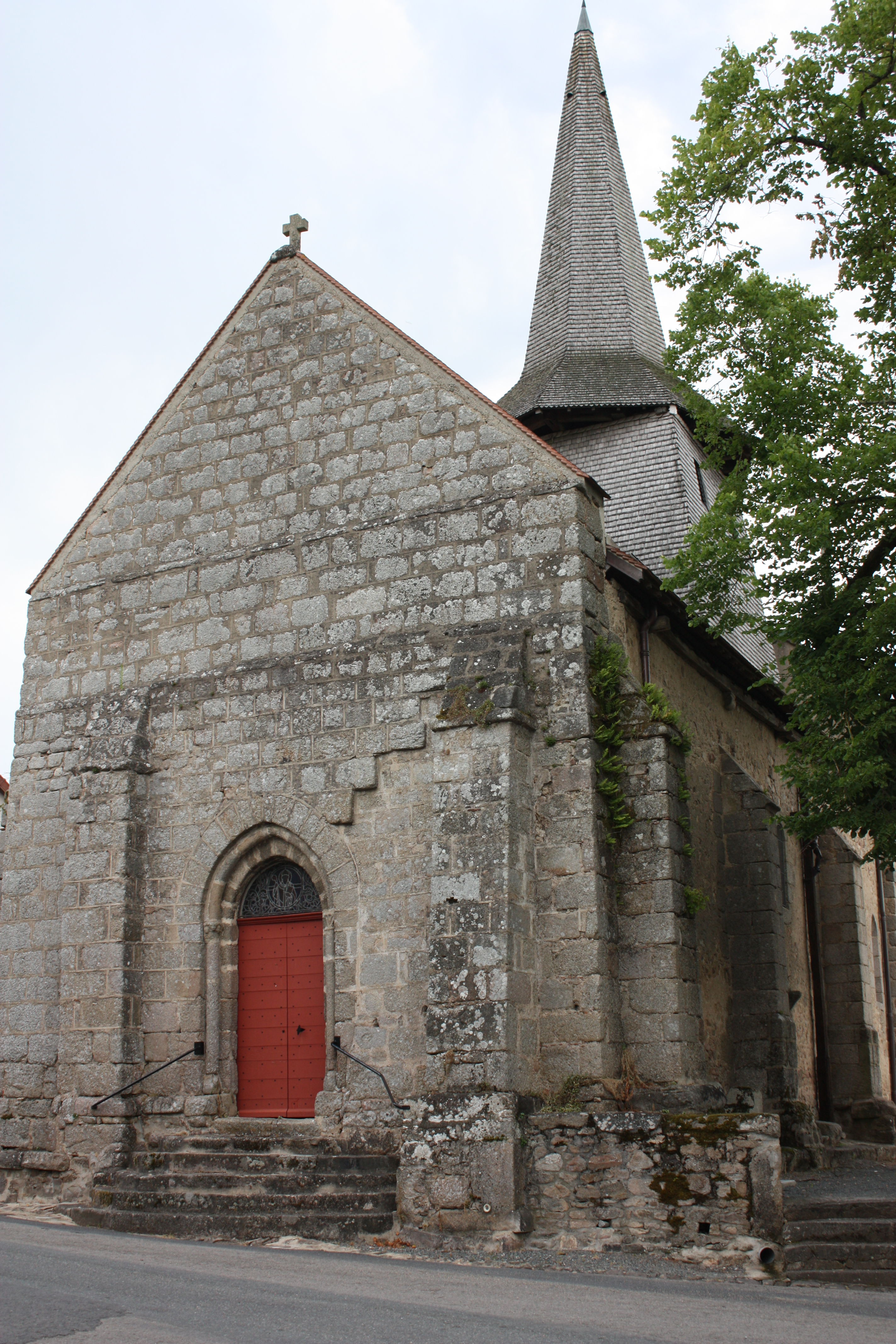 Nouhant - Eglise Saint-Martin Façade Ouest